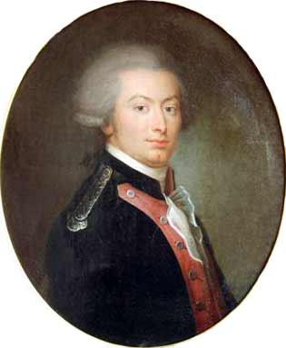 Général La Fayette (1749-1792)